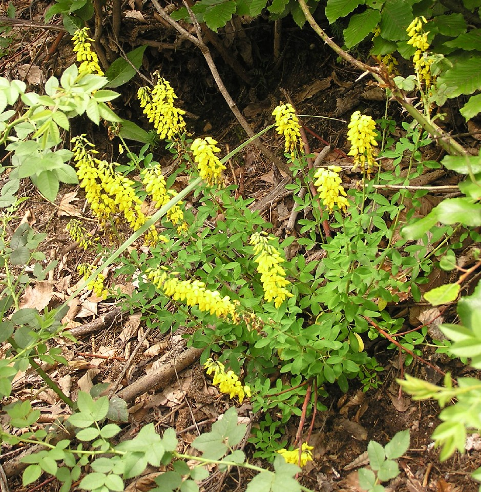 Cytisus nigricans in der Nähe von Faßlberg bei Graz (Österreich)